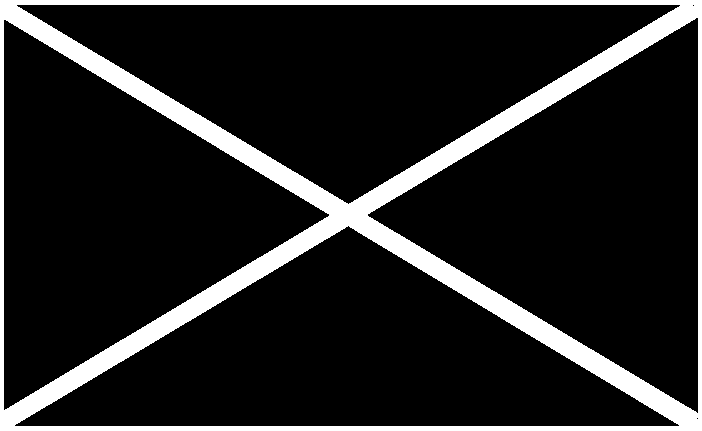 Знамя марковских частей в Добровольческой армии